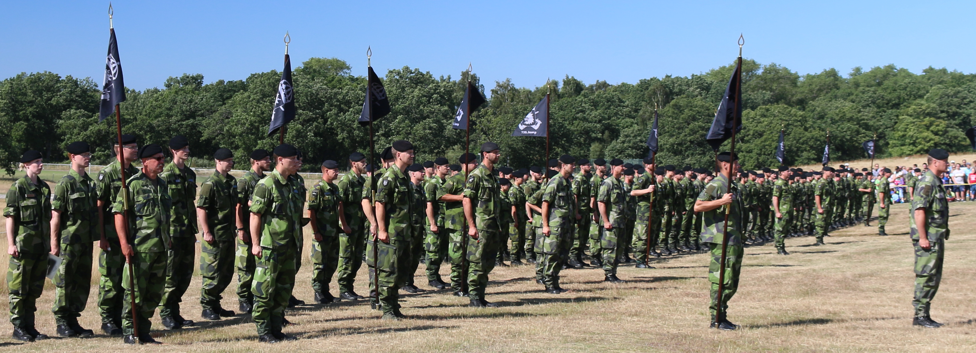 Södra skånska regementet uppställt Revinge 2015